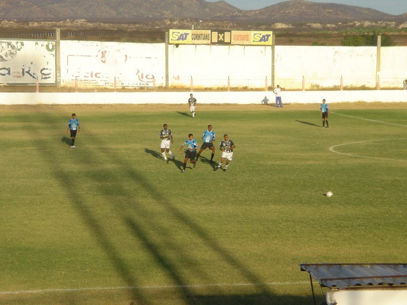 Corintians x Macau pela Copa RN 2007